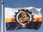 Tarzh An Deiz, drapeau d'Adsav